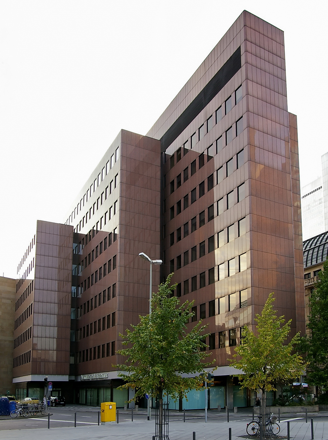 Hauptverwaltung der Deutschen Vermögensberatung in Frankfurt am Main am Willy-Brandt-Platz, gegenüber der EZB